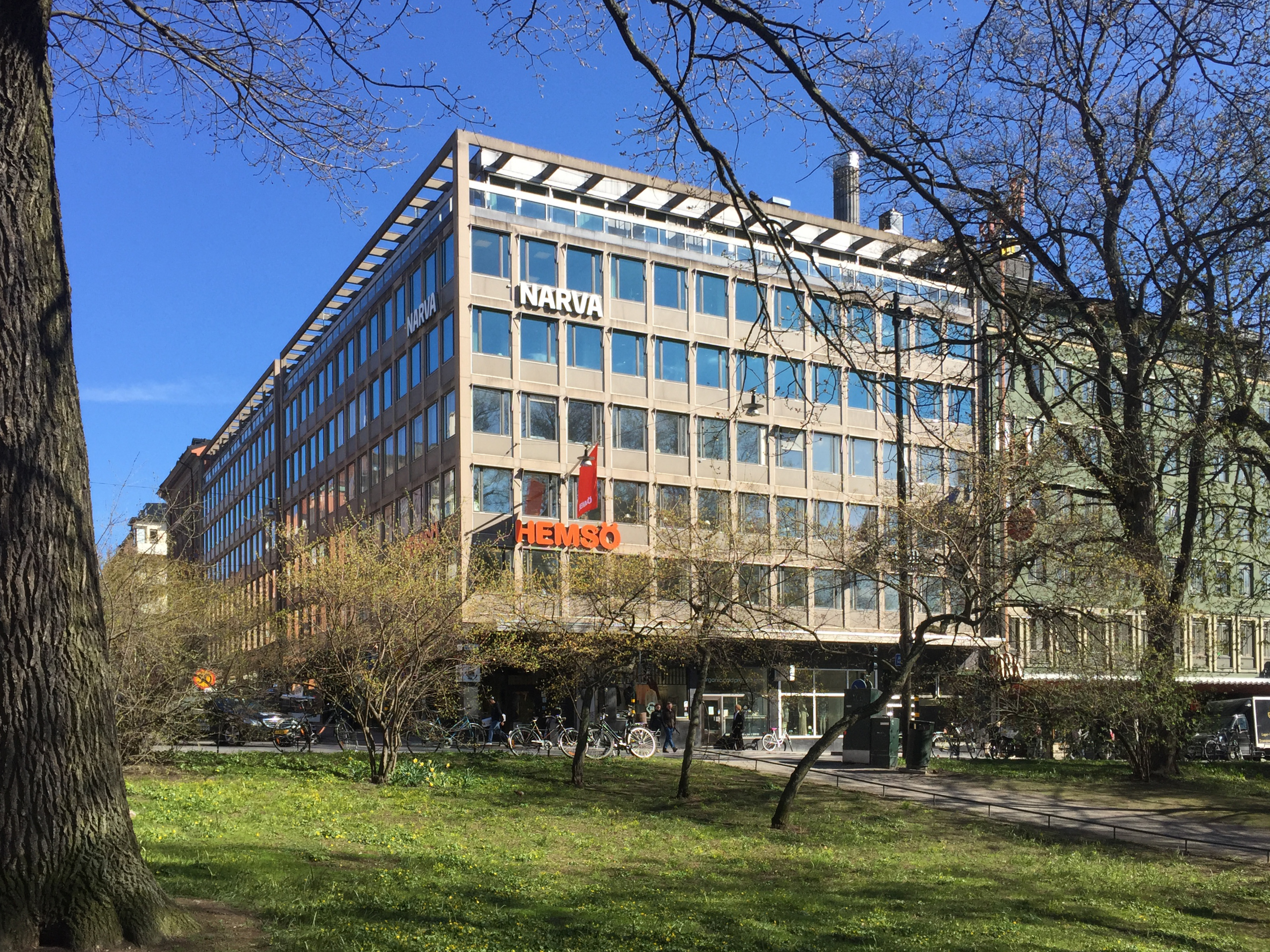 Humlegården 60,Linnégatan 2-4, Sturegatan 20 Stockholm. Nybyggnadsår 1963 - 1966 John Mattson (Byggmästare) Gunnar Lindman & Hans Trygg (Arkitekt) VBB Vattenbyggnadsbyrån (Arkitekt) VBB Vattenbyggnadsbyrån (Byggherre)